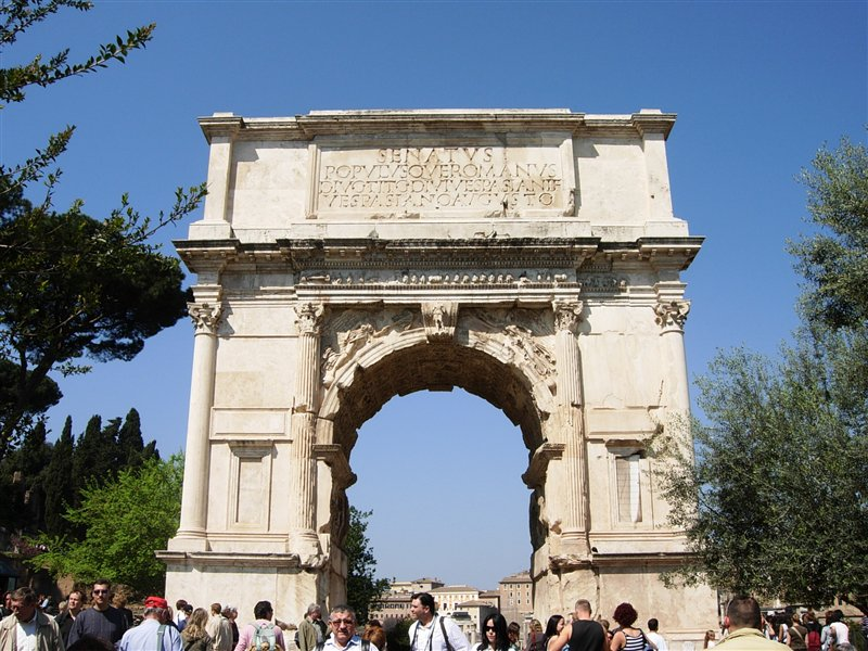 Rome Roman Forum